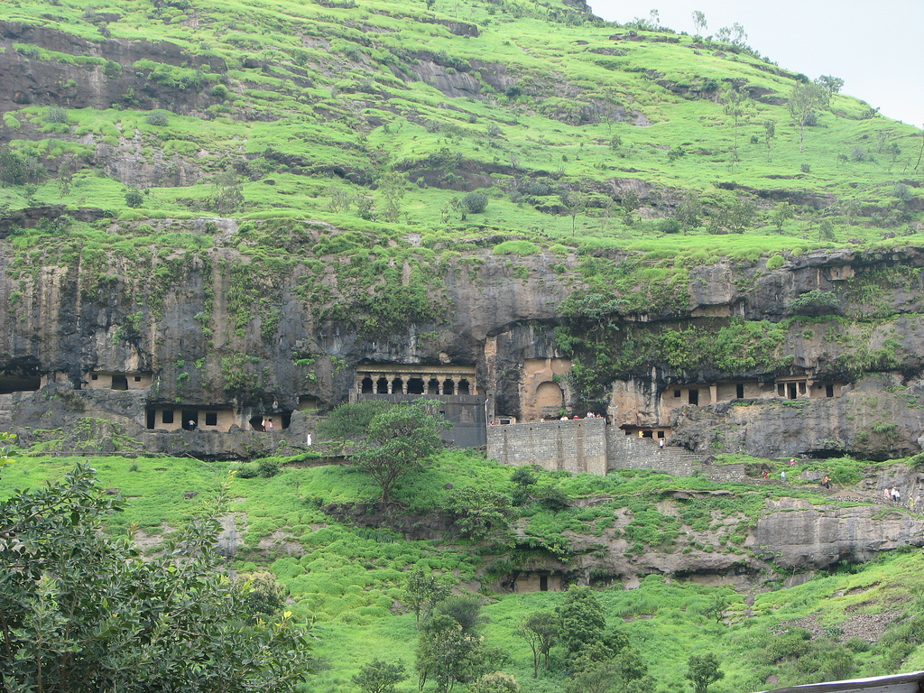 Lenyadri